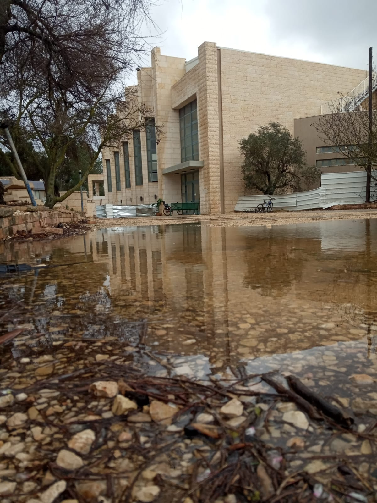 בניין הישיבה ביום גשם